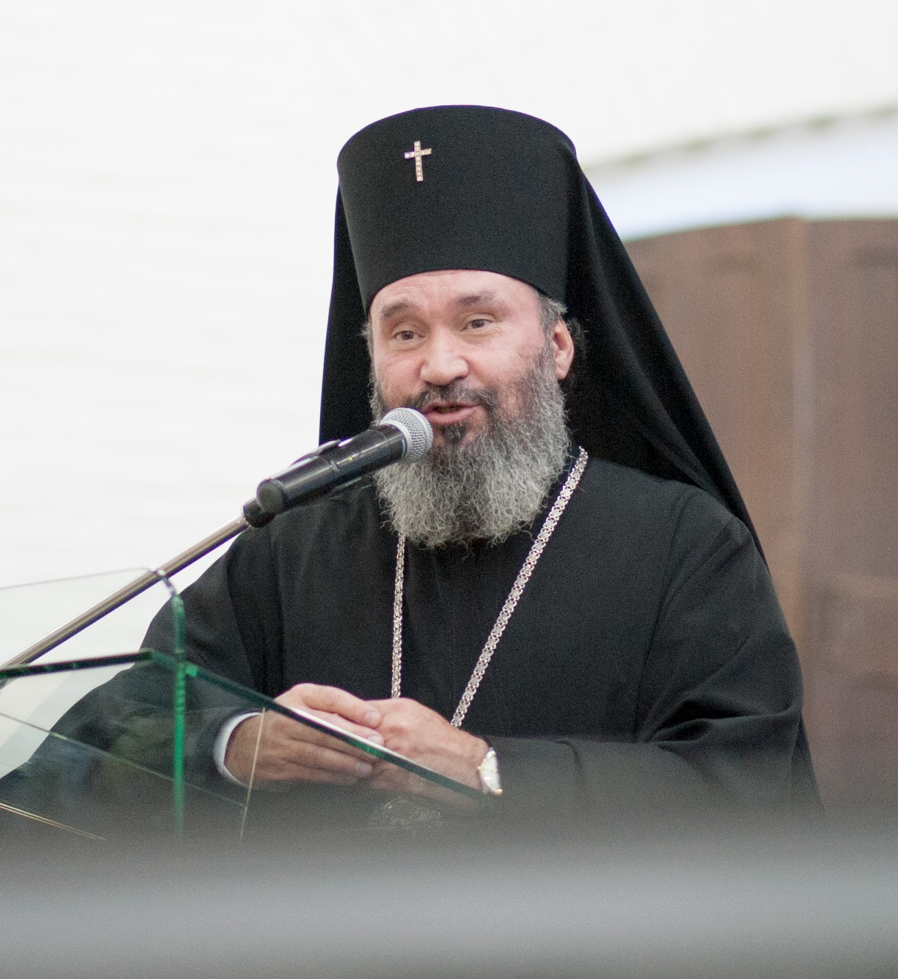 Архиепископ Юстиниан выступает на Астраханском православном народном форуме. 21 сентября 2015 года